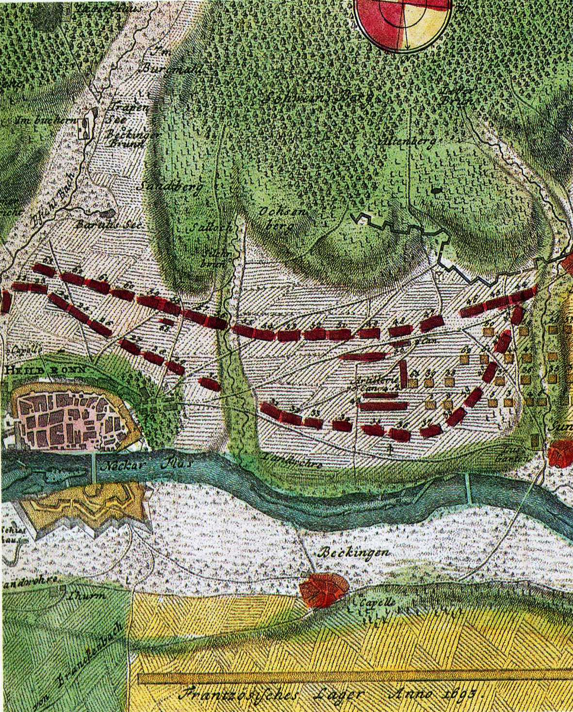 Heilbronn mit Böckingen Französisches Lager 1693